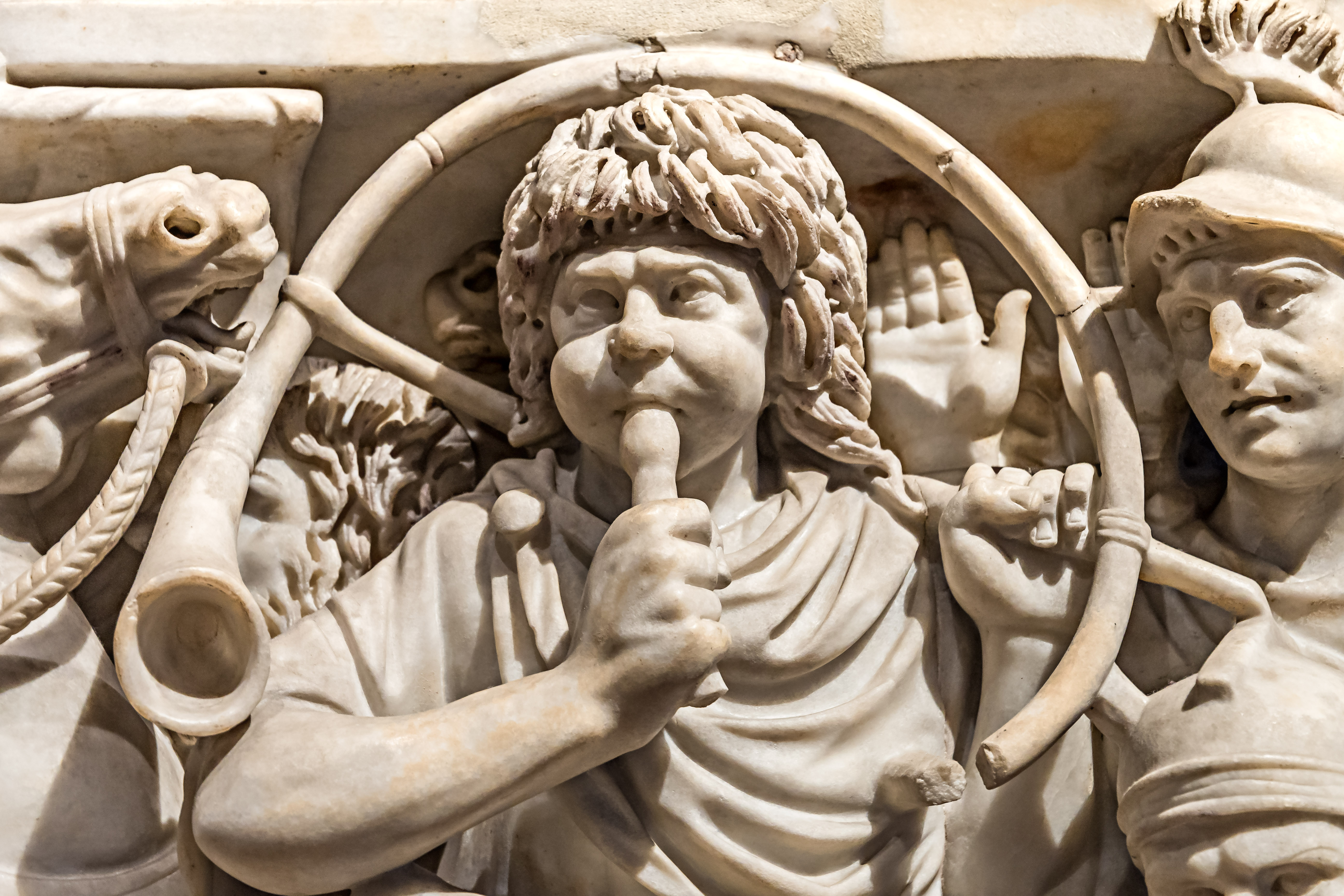 Die Darstellung eines Cornicen auf der Frontseite des sogenannten Ludovisi-Sarkophags aus der Mitte des 3. Jahrhunderts, die eine Schlacht zwischen Römern und Barbaren thematisiert.